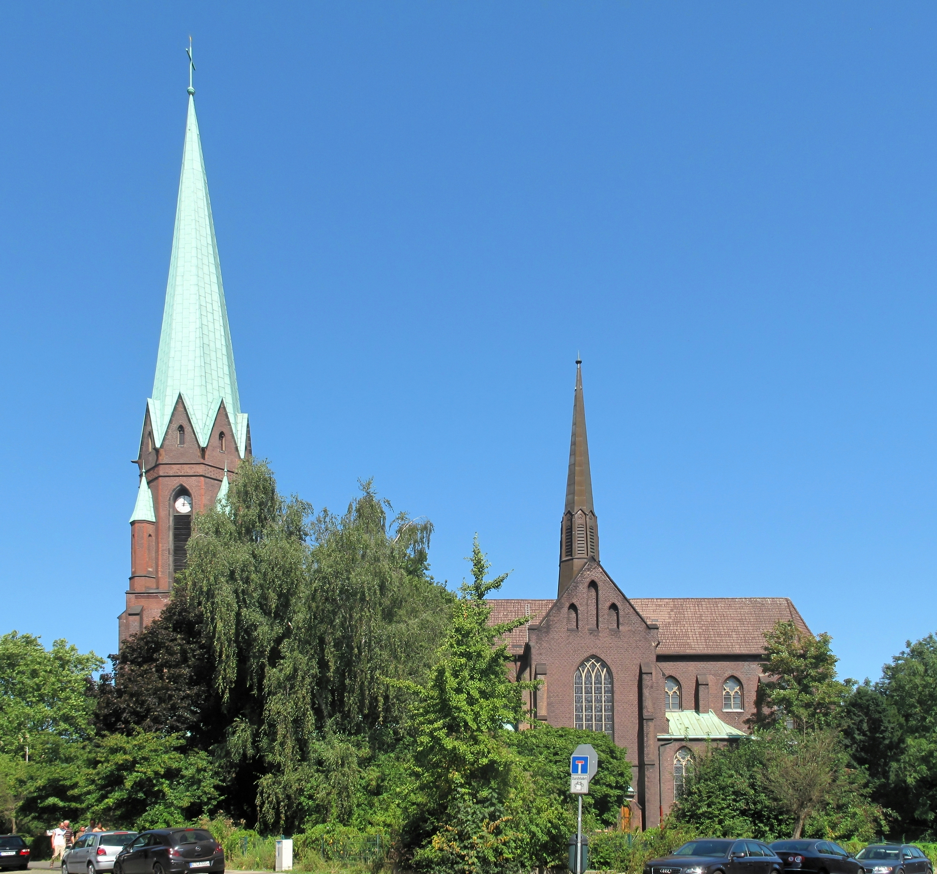 Essen-Katernberg, kath. Kirche St. Josef